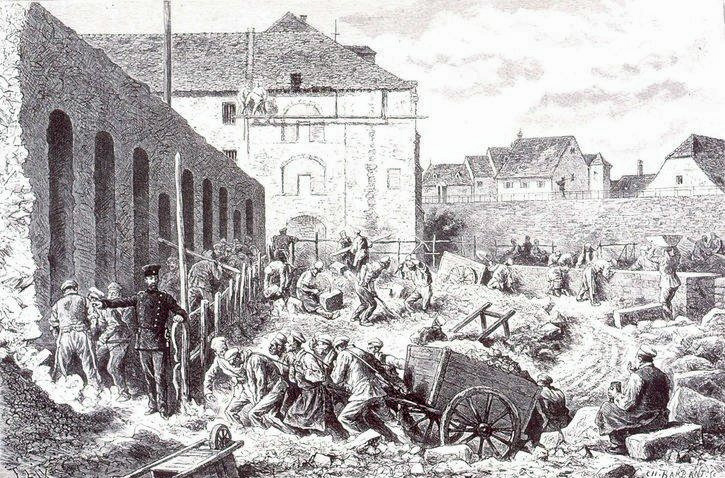 Prisonniers de la maison centrale travaillant aux fondations de la prison cellulaire d'Ensisheim. Bibliothèque nationale et universitaire de Strasbourg